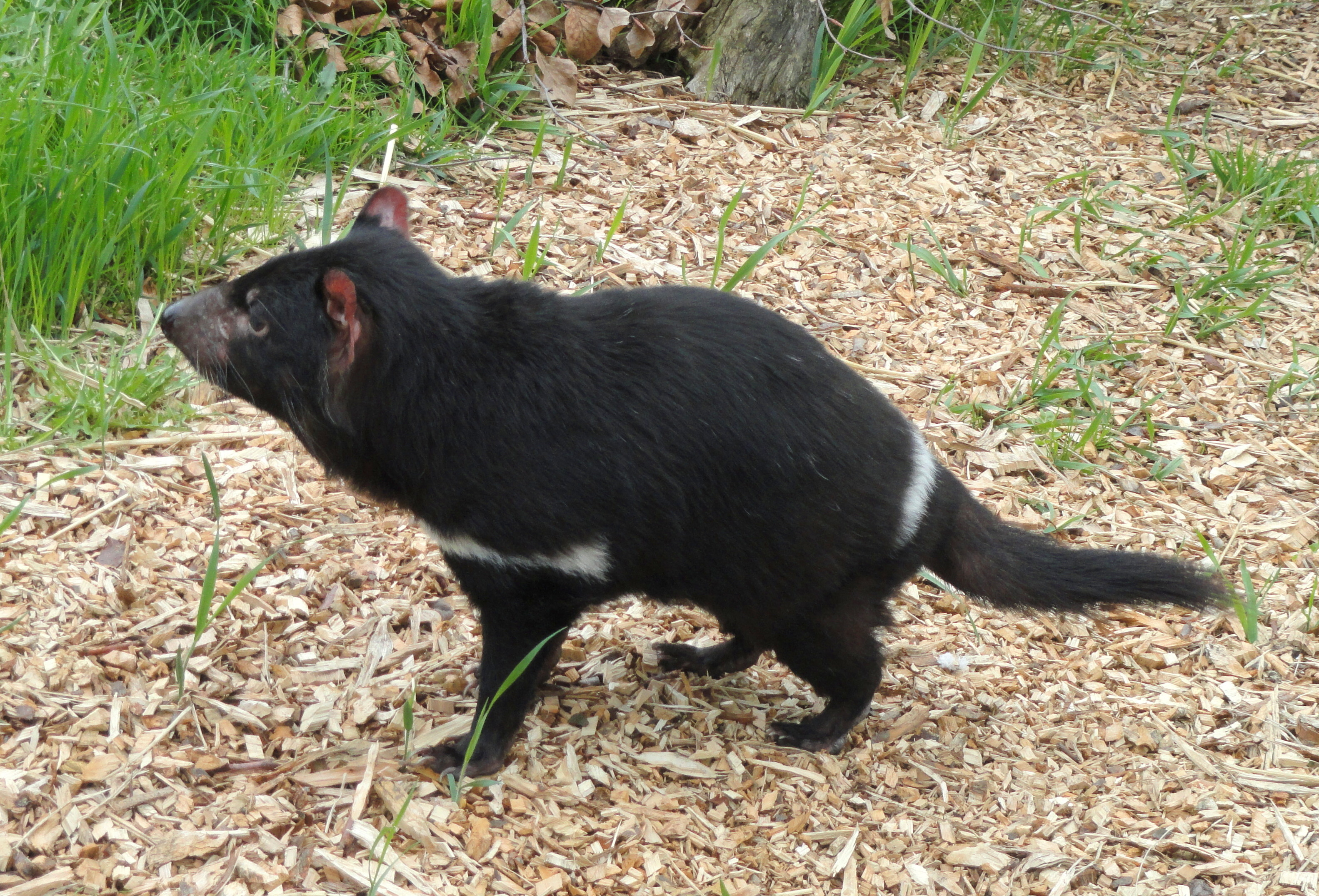 Copenhagen Zoo, Frederiksberg, Copenhagen, Denmark.